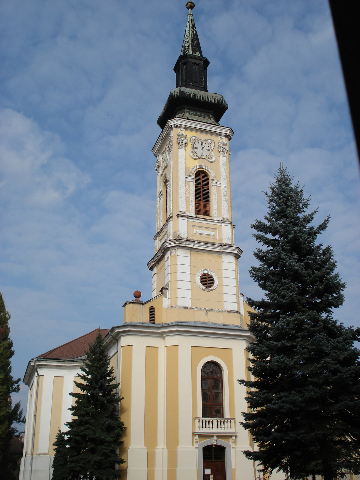 Ev. templom (Miskolc, Hunyadi u. 8 .) This is a photo of a monument in Hungary, Identifier: 2948